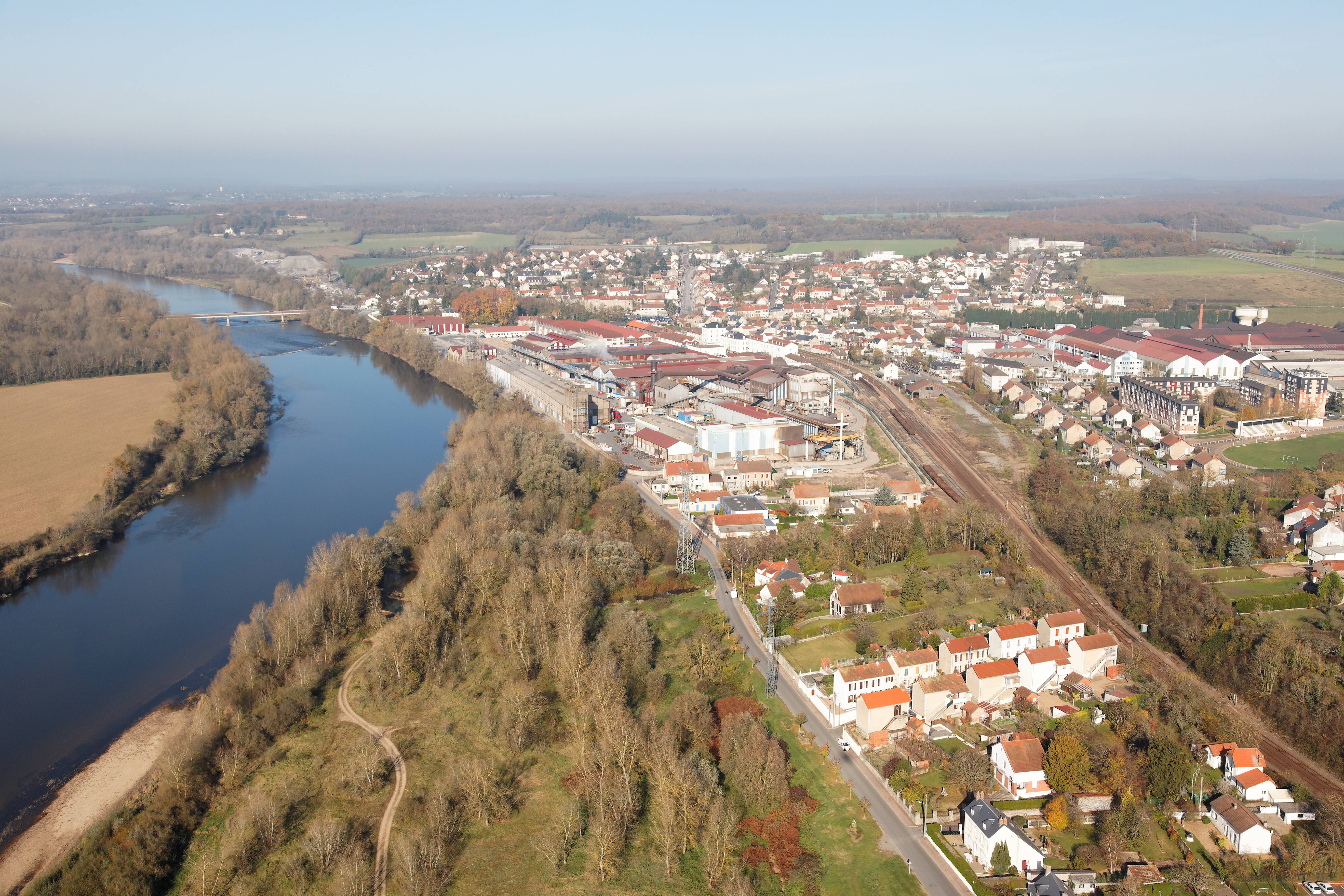 La Loire et une partie du site industriel